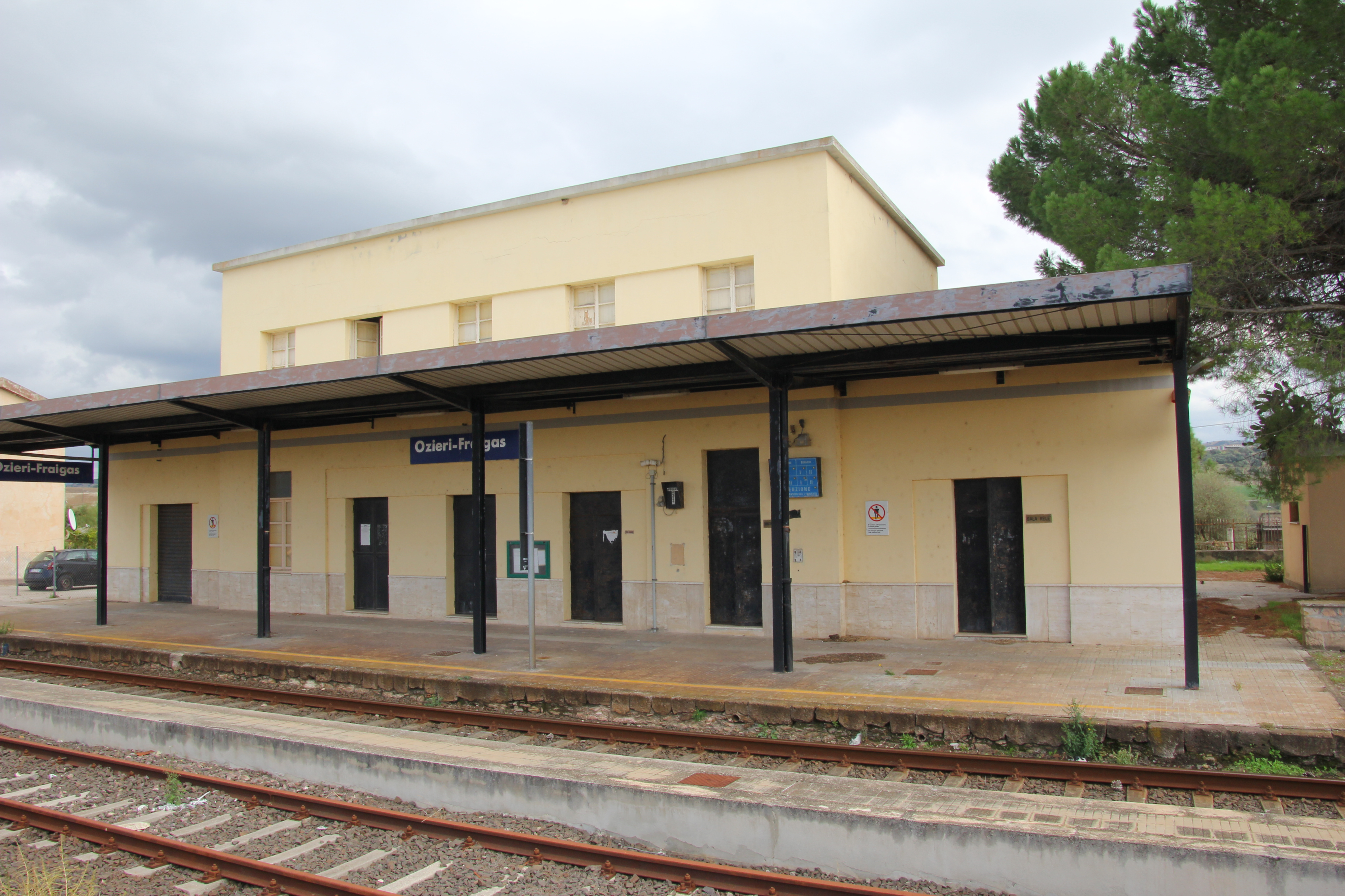 Ozieri - Stazione di Fraigas